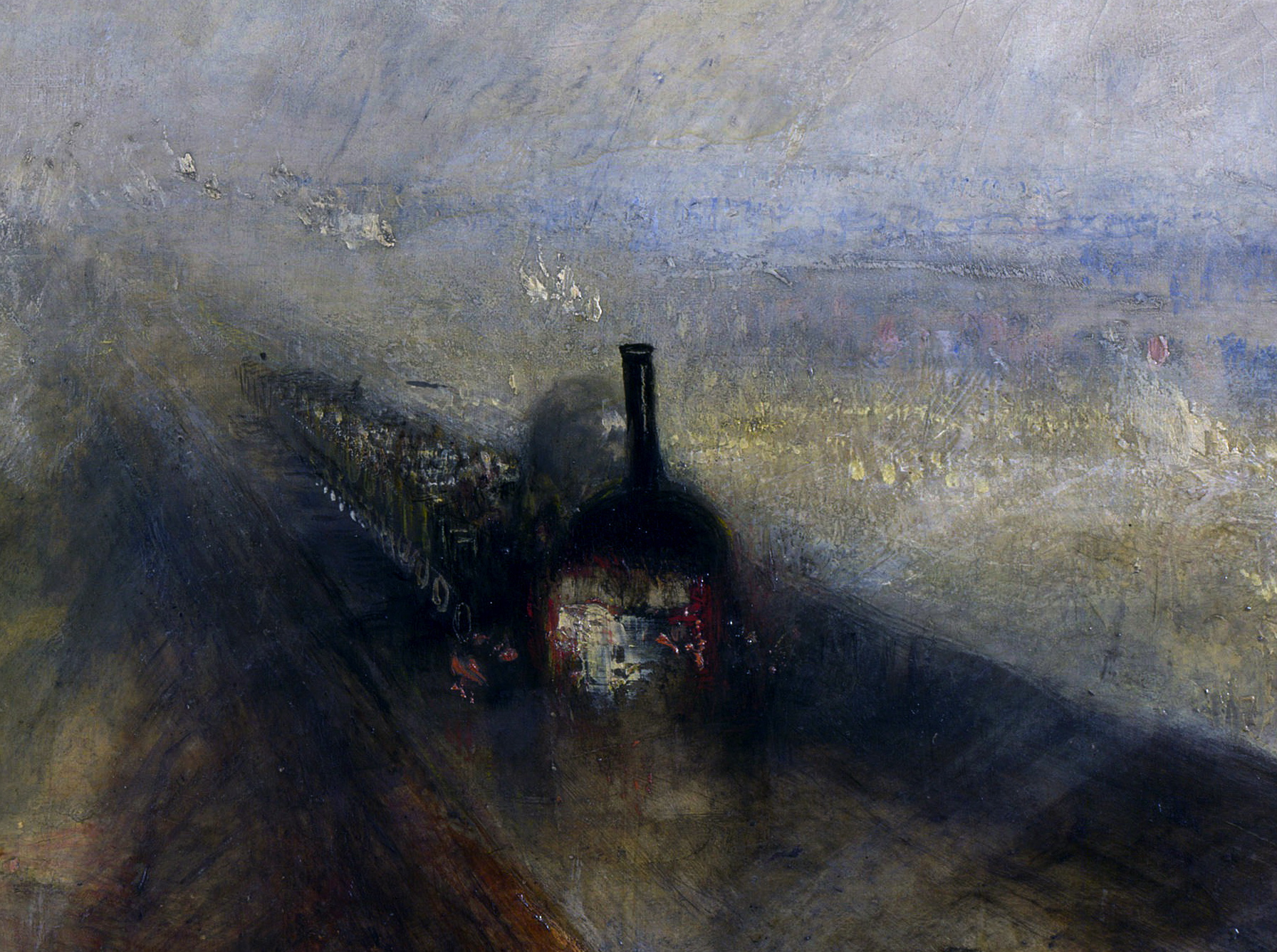 detail